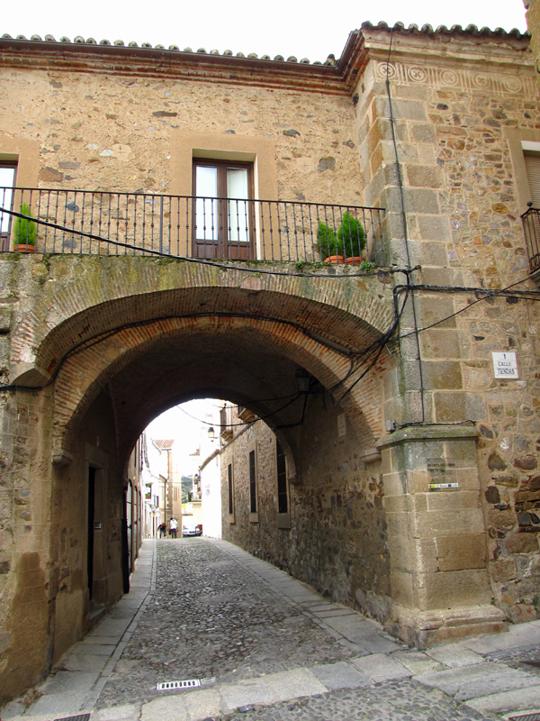 Puerta de Coria en la ciudad de Cáceres.